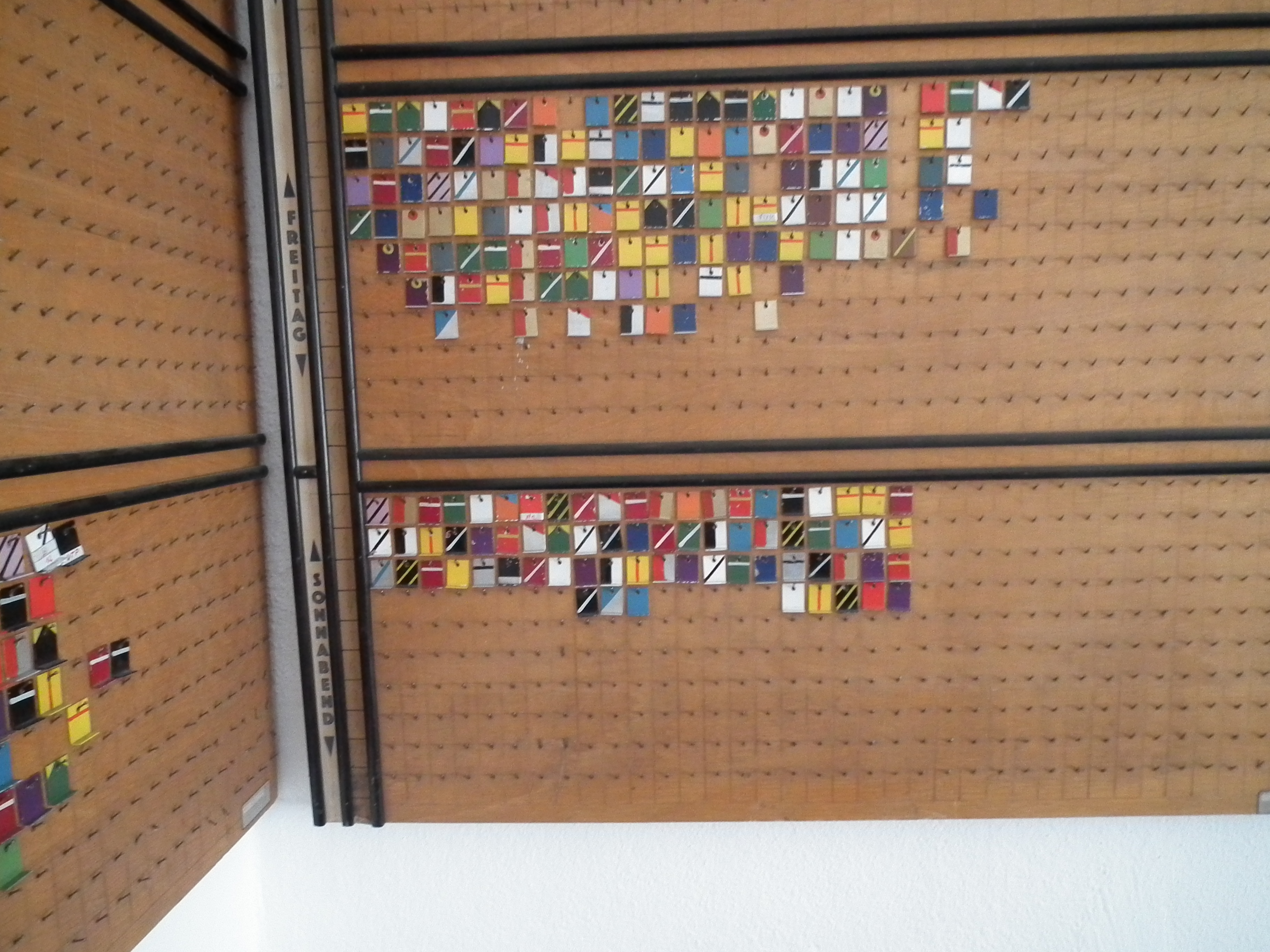 Ebersdorfer Schulmuseum, ein symbolisierter Stundenplan für Lehrer im Lehrerzimmer